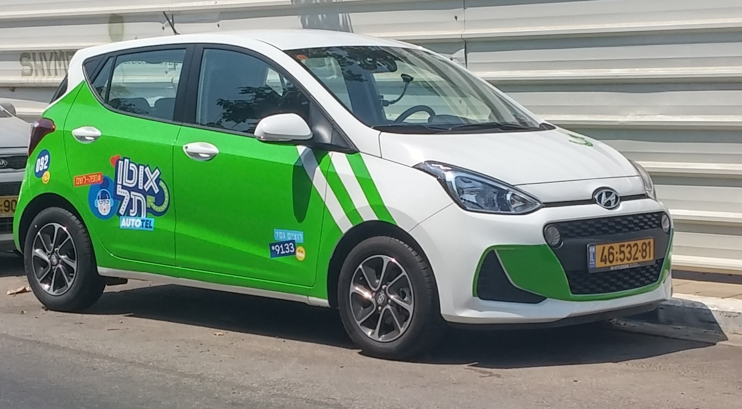 מכונית של מיזם אוטו-תל